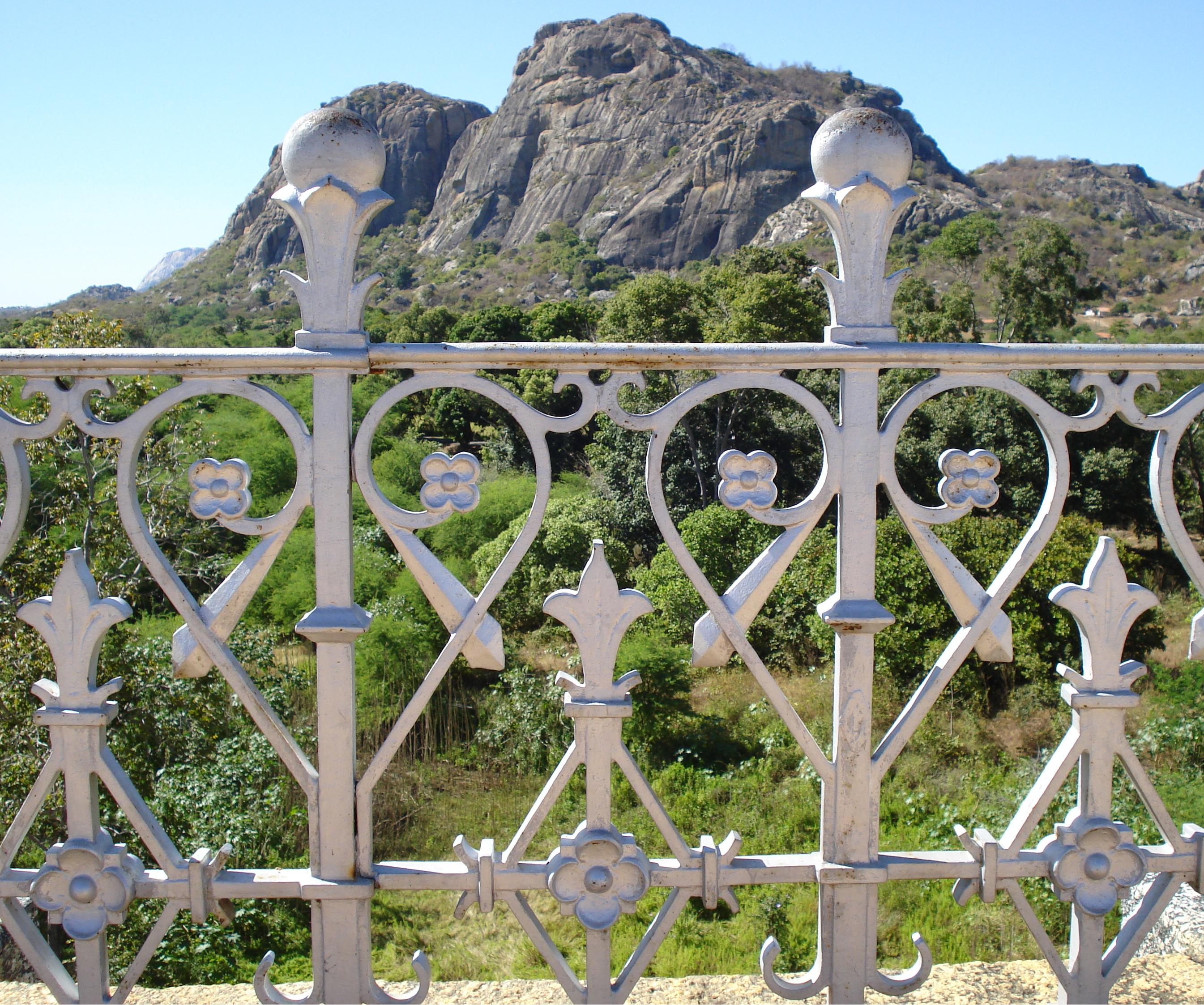 Grade existente na parede do açude do cedro em Quixadá, Ceará, Brasil.